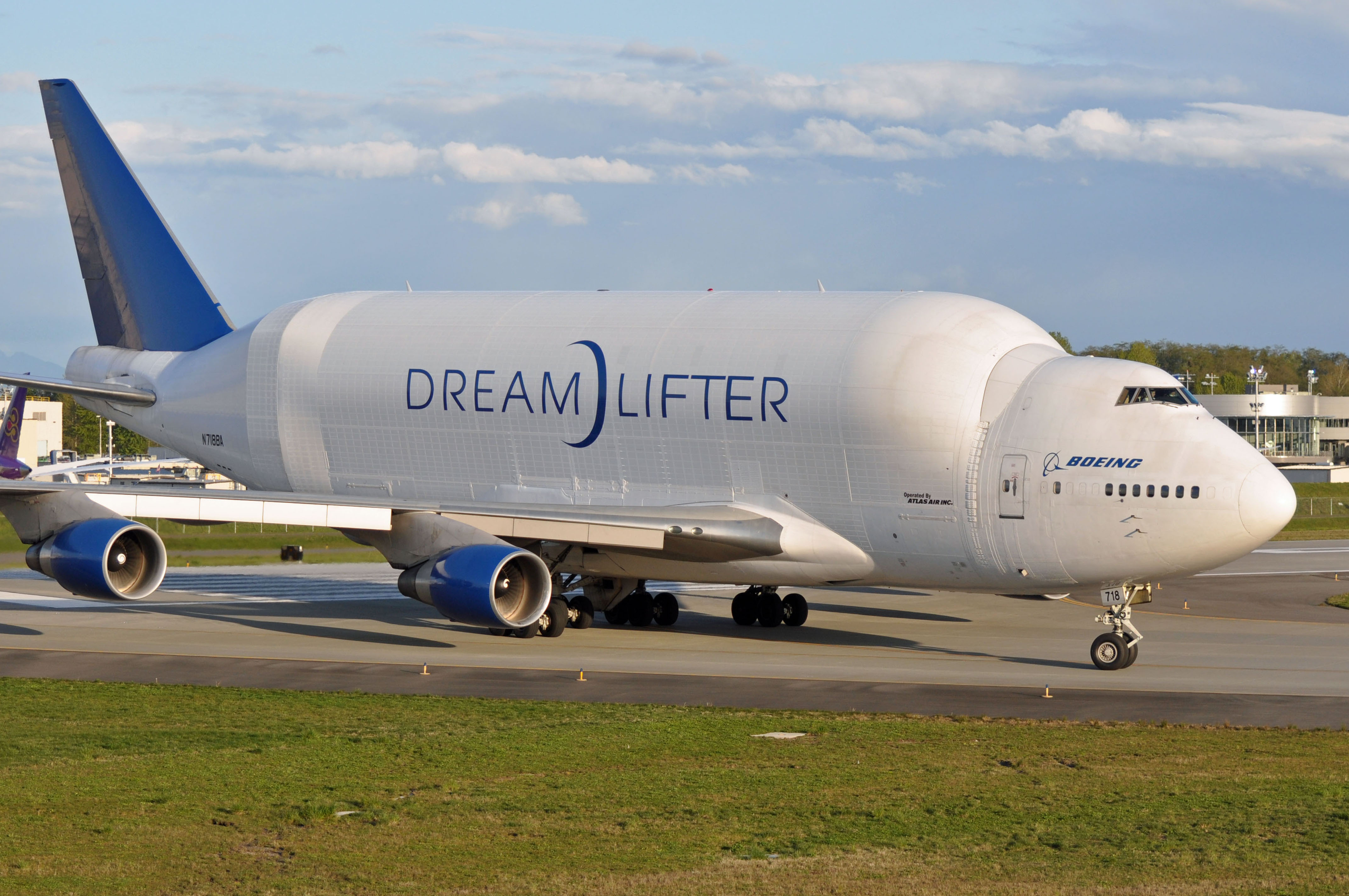 MSN 27042 LN 932 B747-4H6(LCF) / 747 / 747-400 / 747-400F BOEING PAE AIRPORT EX MALAYSIA AIRLINES AS 9M-MPA